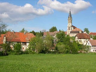 Village de Réchésy (Territoire de Belfort) Photo prise en mai 2004 par LP90 licence